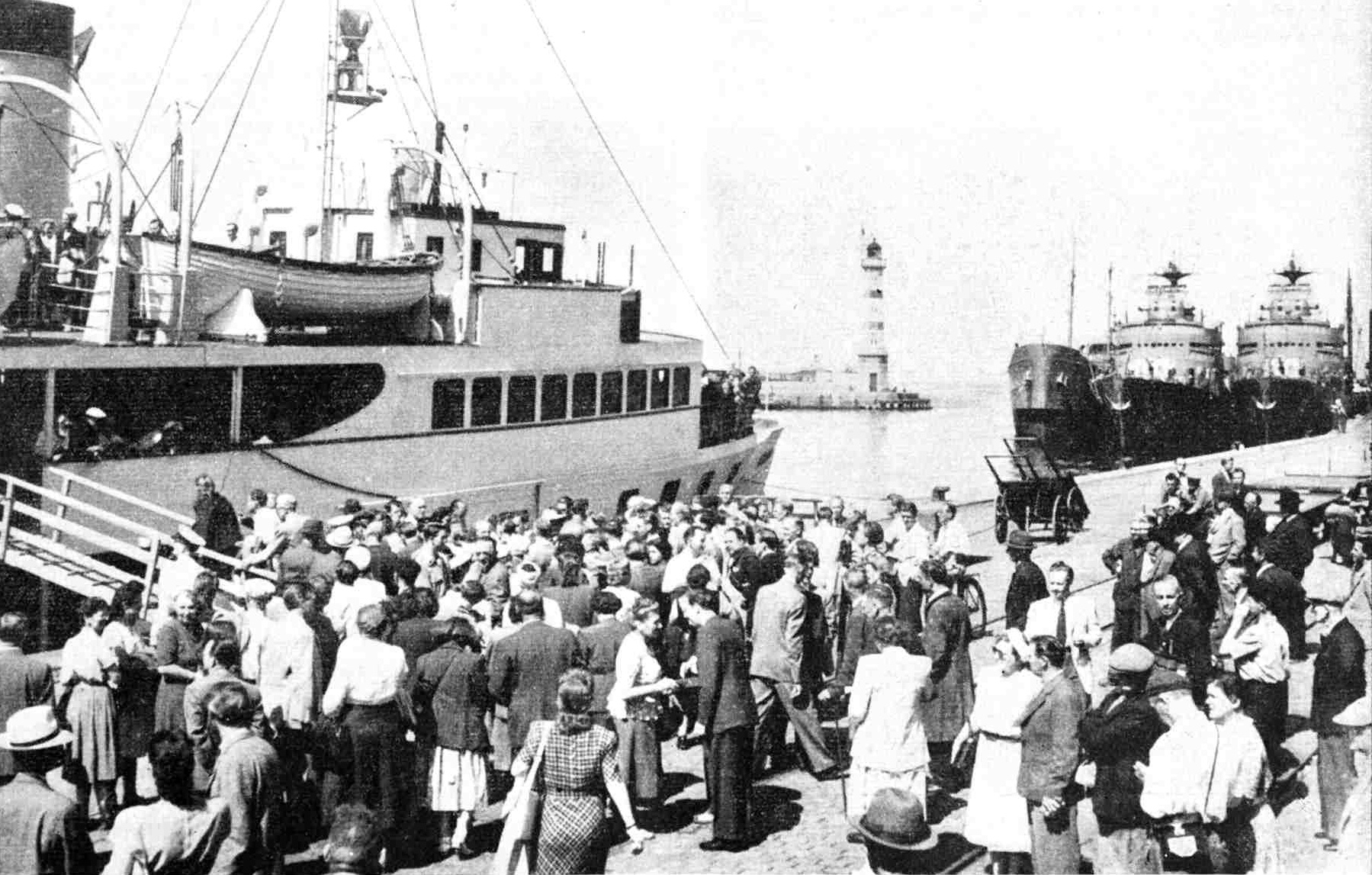 UK 1948. Krozado en la markolo Öresund. Sur la kajo antaŭ la forveturo